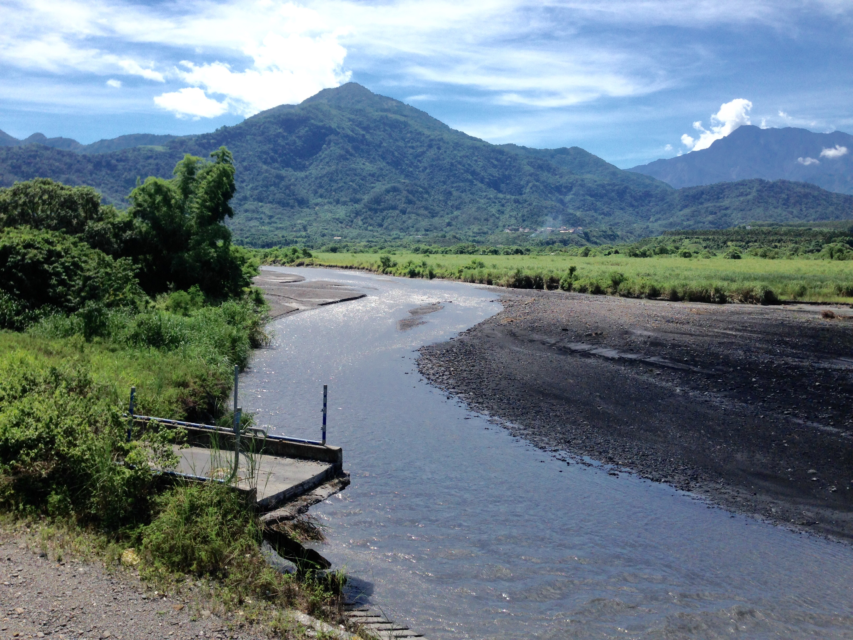 中文（台灣）: 口社溪與斷橋